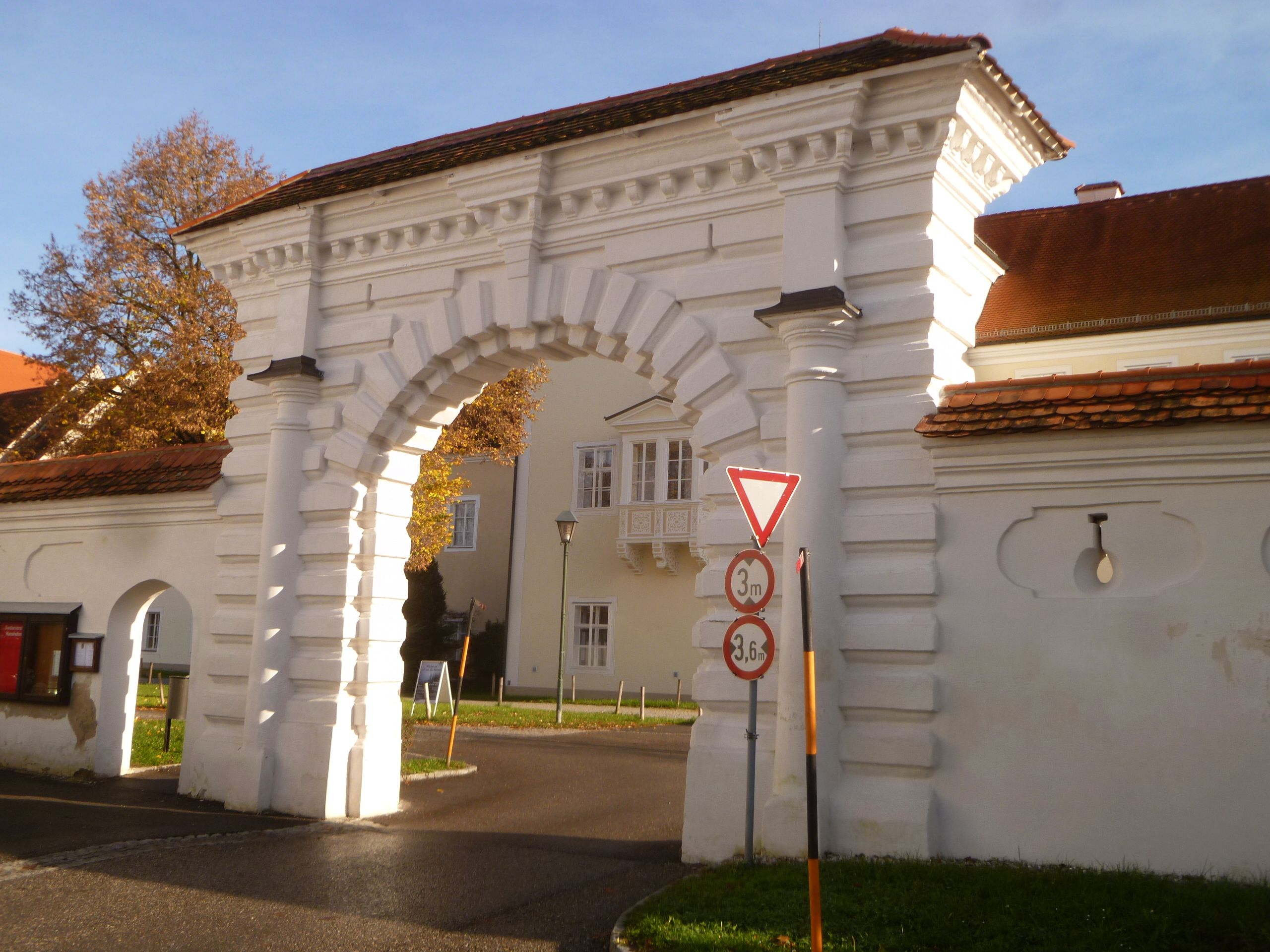 Gesamtanlage des ehem. Augustiner-Chorherrenklosters Ranshofen: Pfarrkirche (Stiftskirche), "Schlössl" (Klostertrakte), Meierhof, Friedhof mit Karner, Einfriedungsmauern mit Portalanlagen, Gartenbaudenkmale im ehem. Konventgarten; Reste von Vorgängerbauten